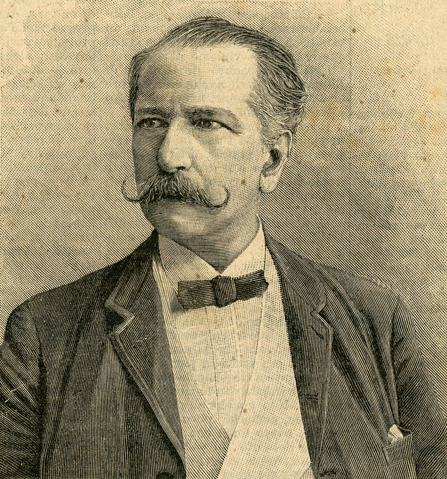 Federico Seismit Doda, nuovo ministro delle Finanze (xilografia).